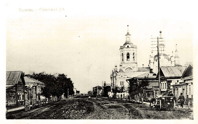 Дореволюционная фотография Спасской улицы (ныне ул.Ленина) в Тюмени с видом Спасской церкви.